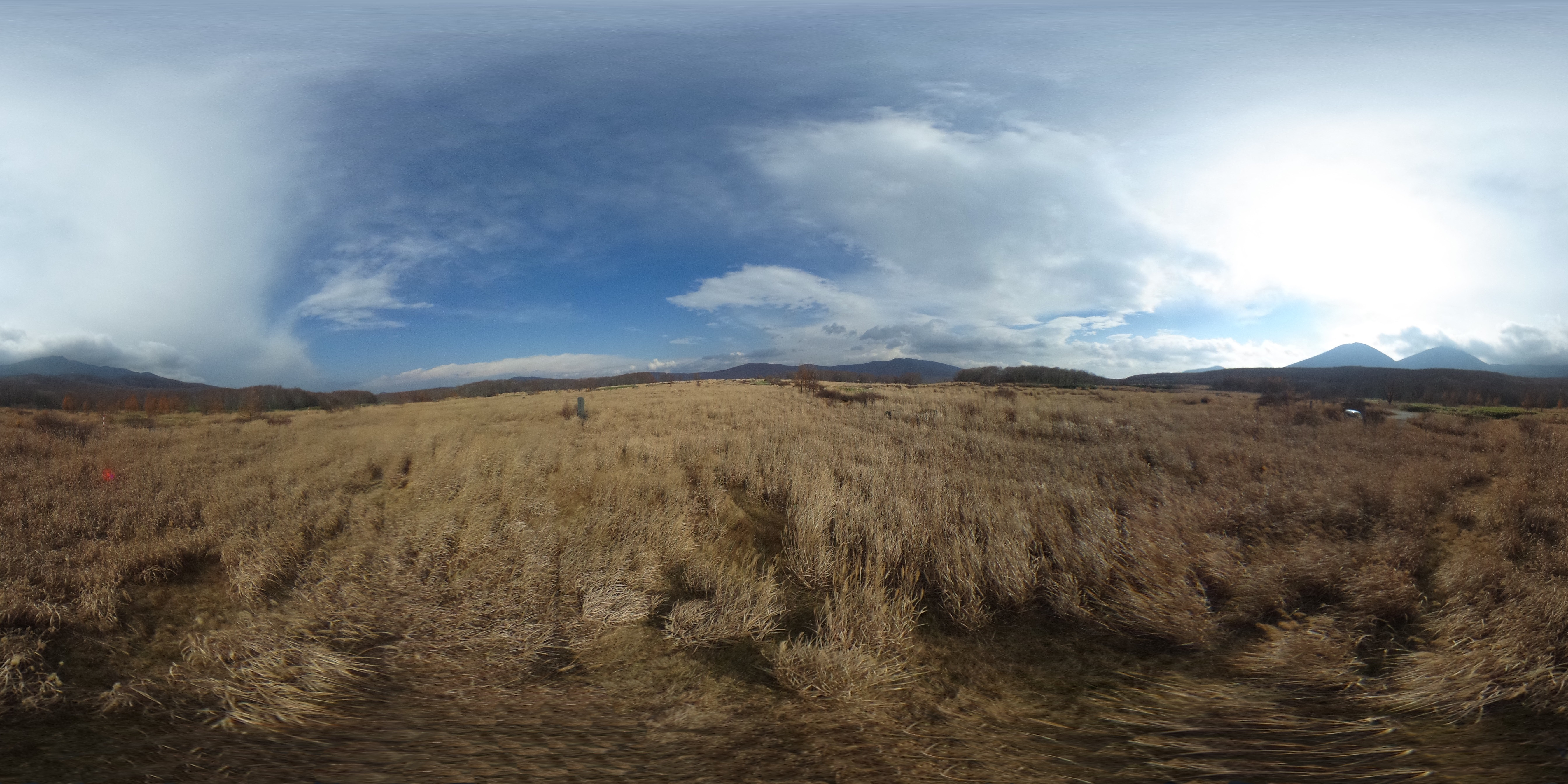 日本国,青森県,青森市,田代牧場,草地造成之地,RICOH THETA,全天球写真,ストリートビュー,360度